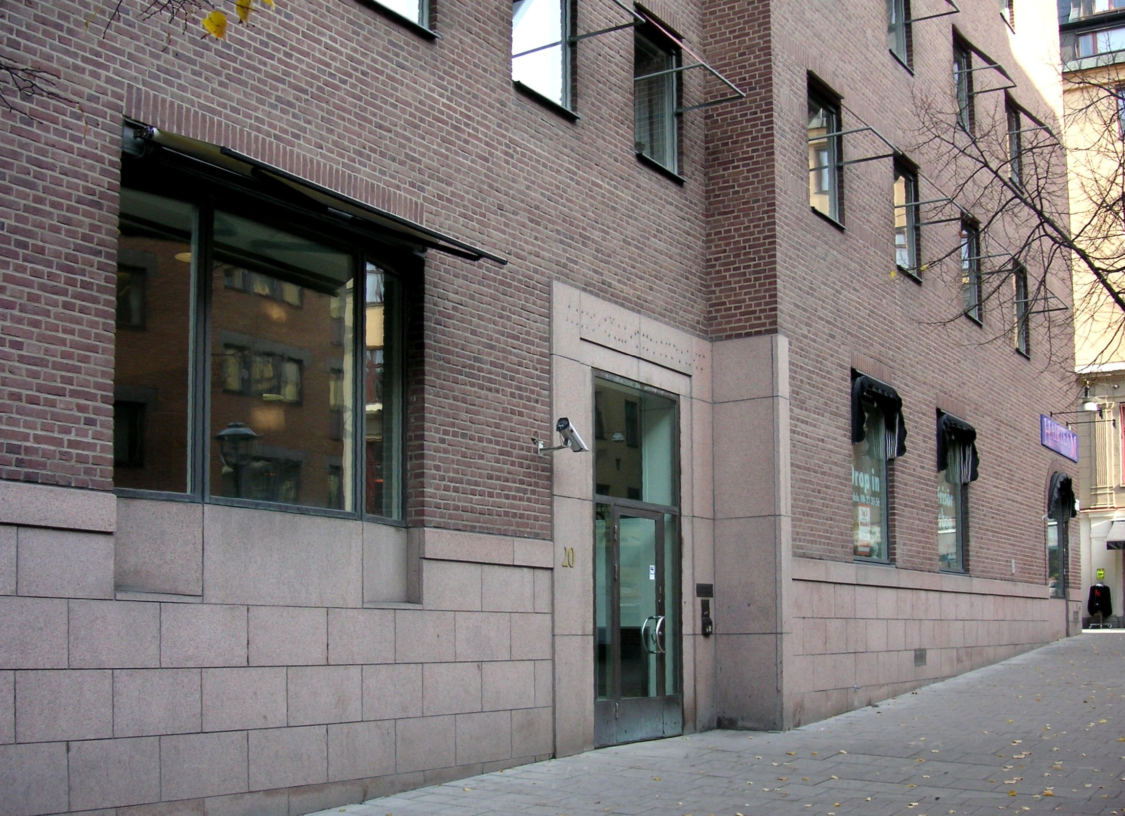 Jakobsgatan 20 i Stockholm 2007, byggår 1976 - 1977, nytt ämbetshus för finansdepartementet med Byggnadsstyrelsen som byggherre och Nils Tesch som arkitekt.